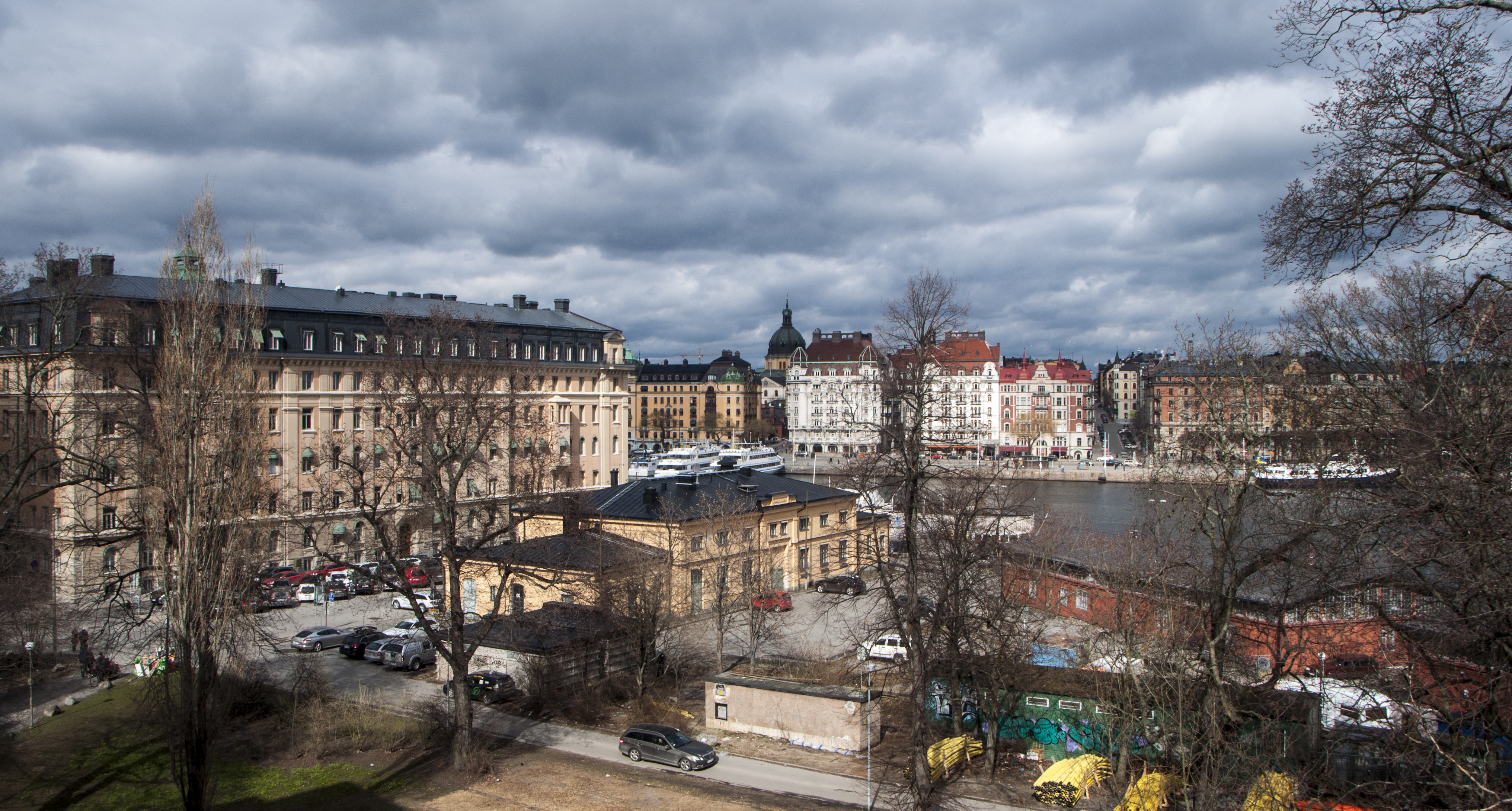 Planområde för Nobel Center på Blasieholmen sett från Nationalmuseum